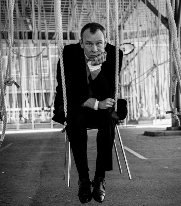 Jens Arentzen in Copenhagen TAP 2